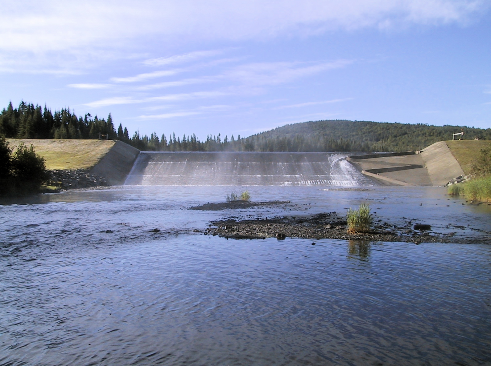 Passe à poisson du lac Rimouski